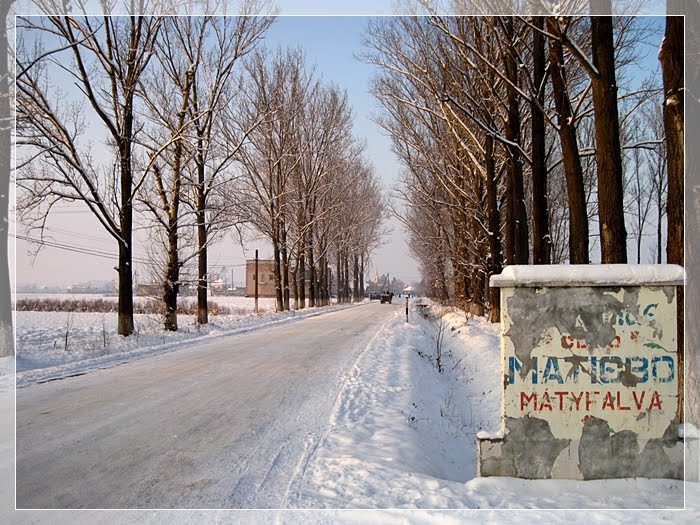 Üdvözlőtábla Mátyfalván